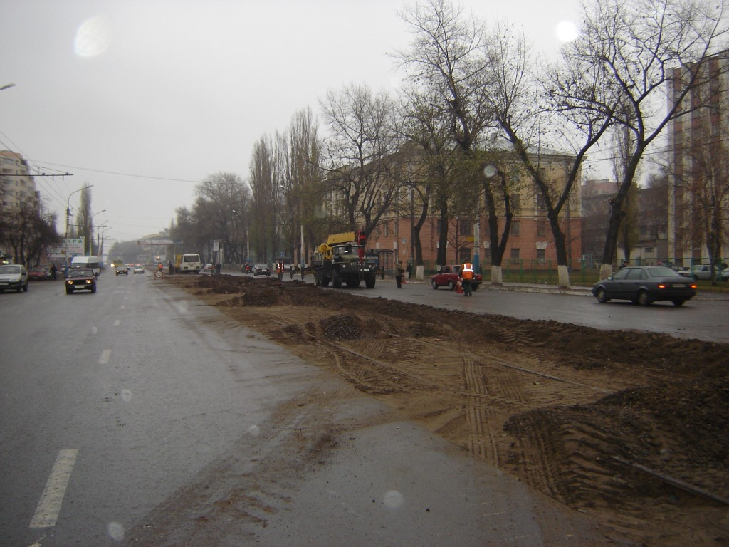 Демонтаж трамвайных путей на ул. 20-Летия Октября в 2008 году.